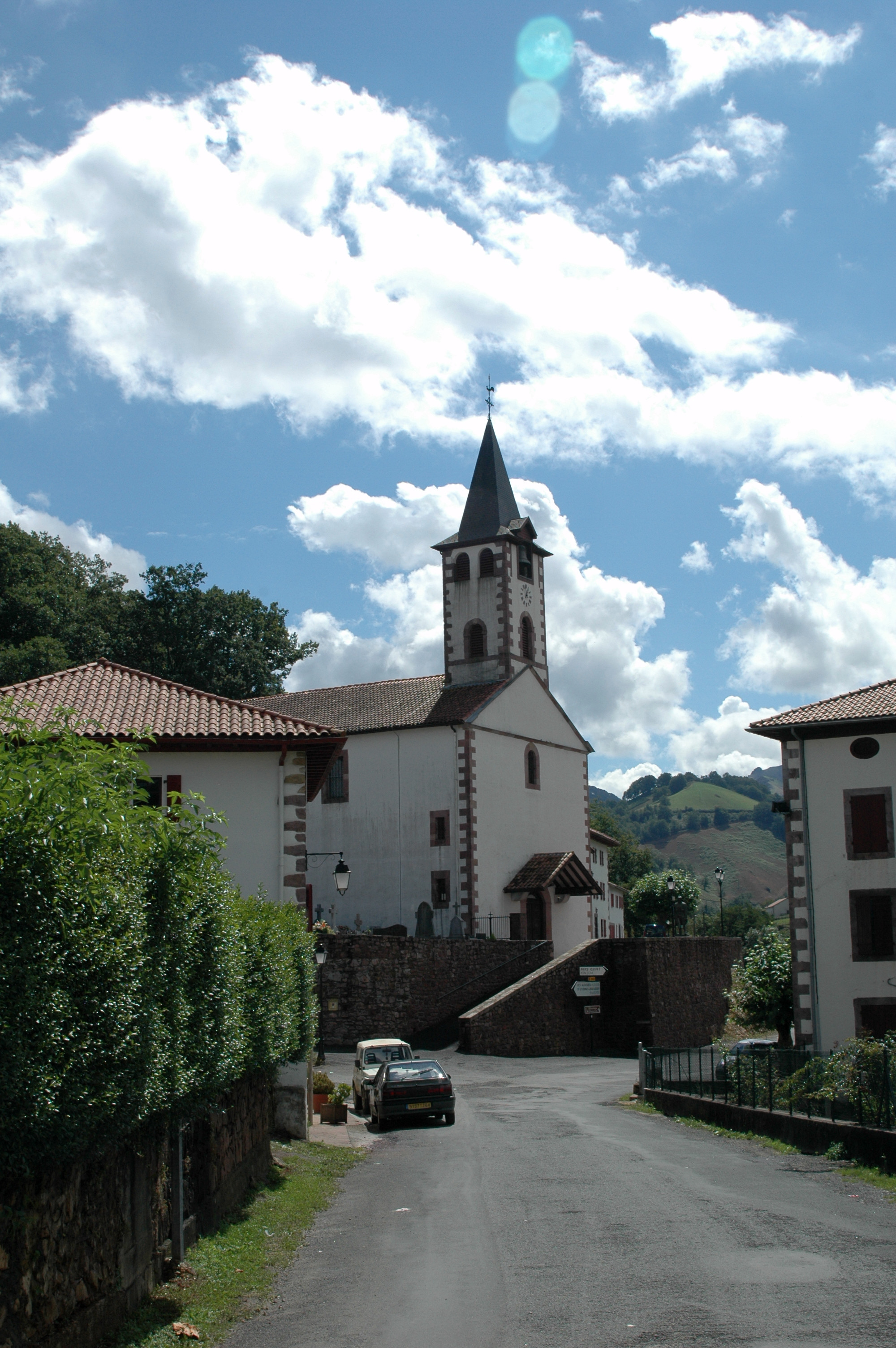 Urepel, l'église paroissiale